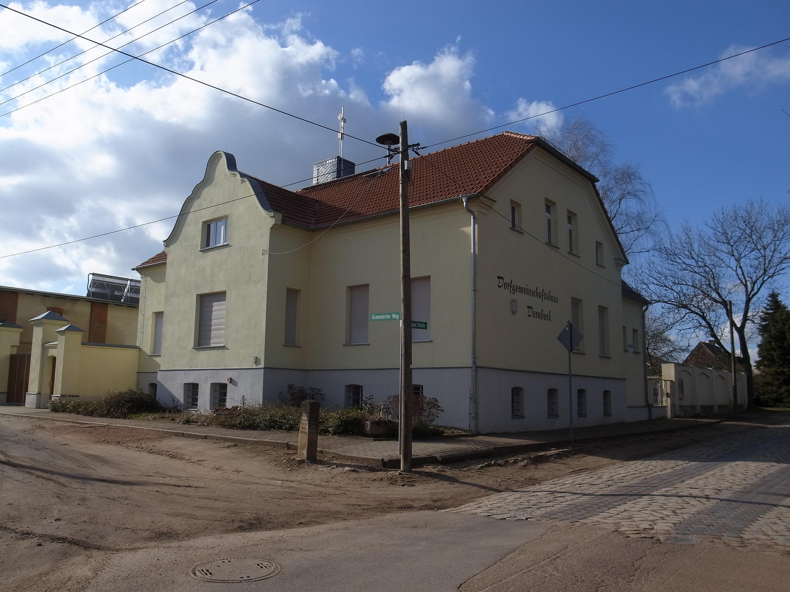 Dornbock, Dorfgemeinschaftshaus